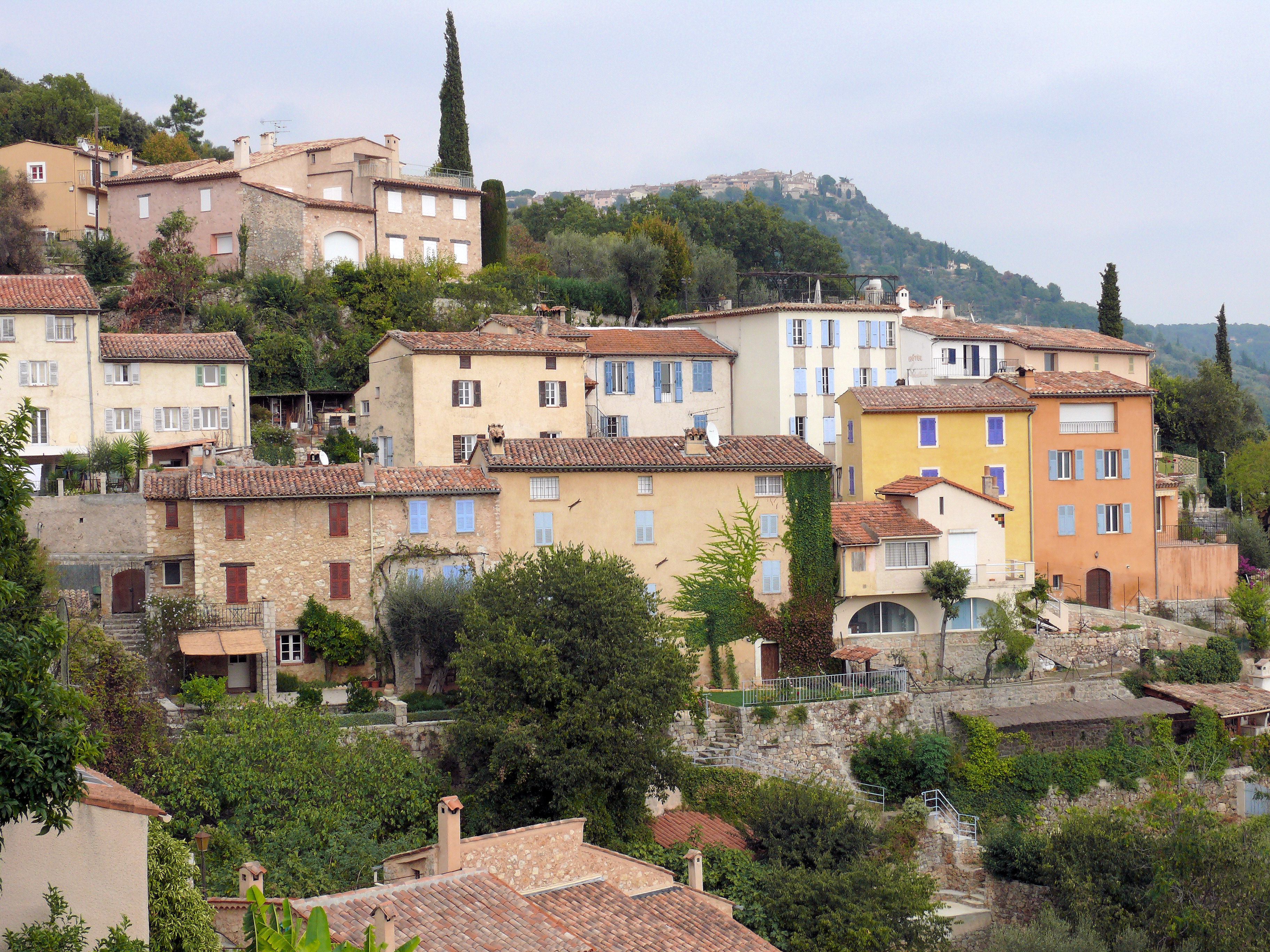 Spéracèdes - Vue du village vers Cabris